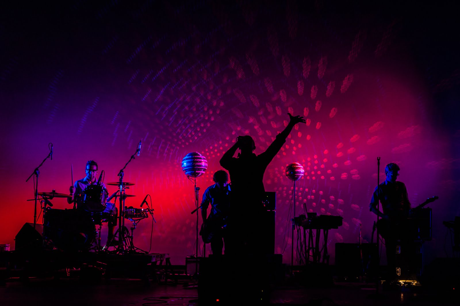 Perturbazione Live 2015